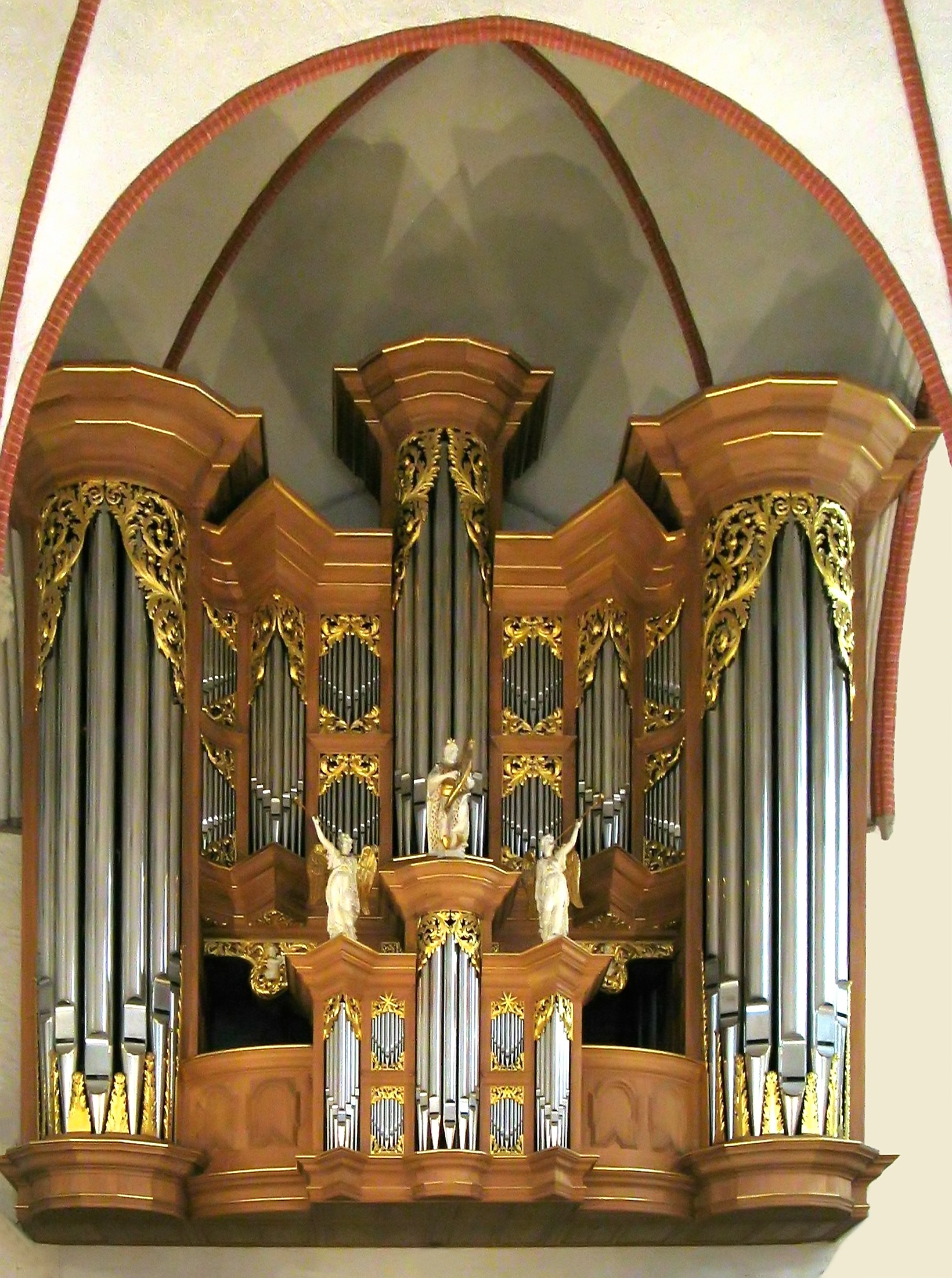 Arp Schnitger organ in the church of St. Jacobi, HamburgThis is a photograph of an architectural monument.